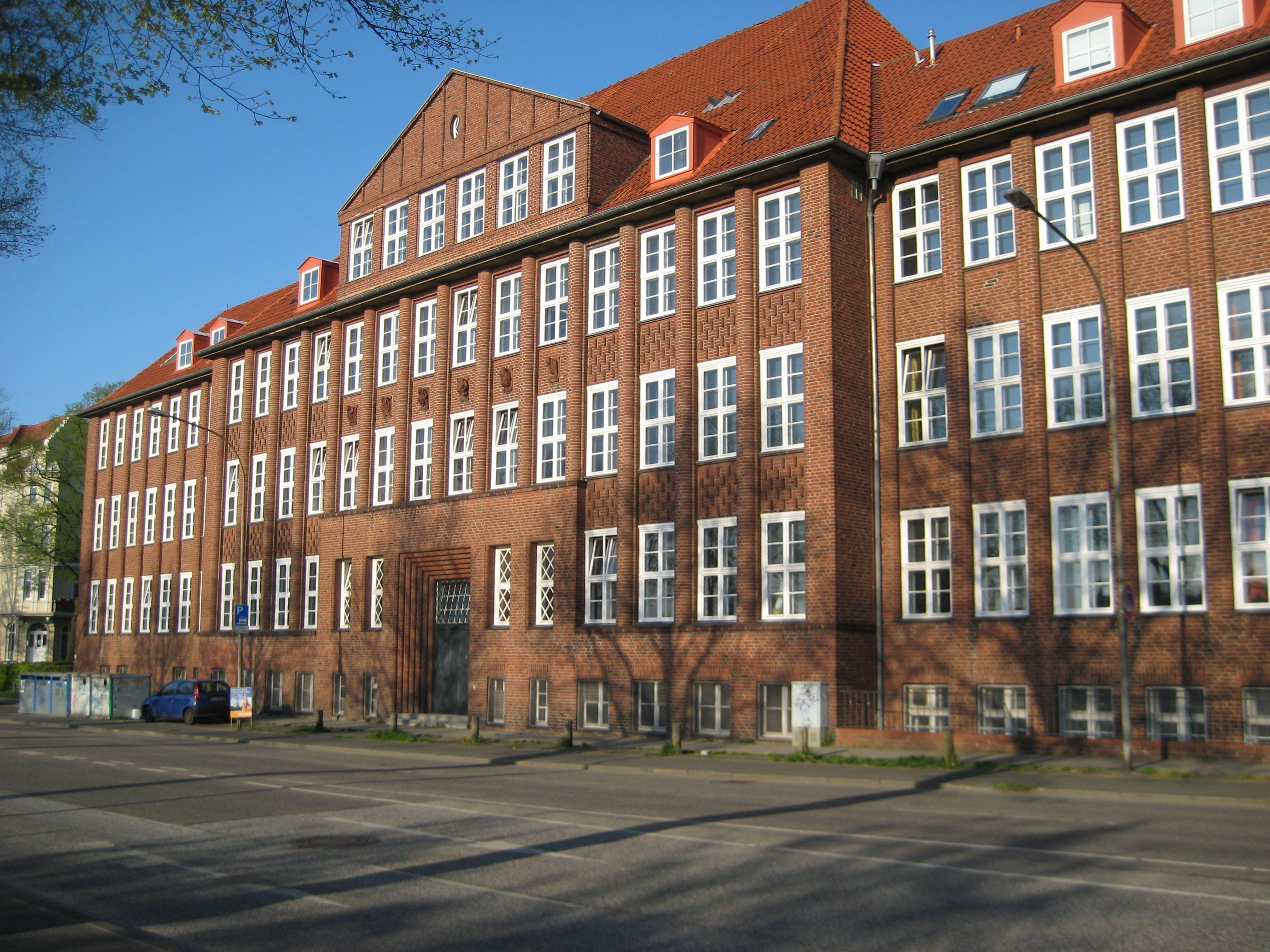 Alte Stadtschule in Lübeck, gebaut von Carl Mühlenpfordt